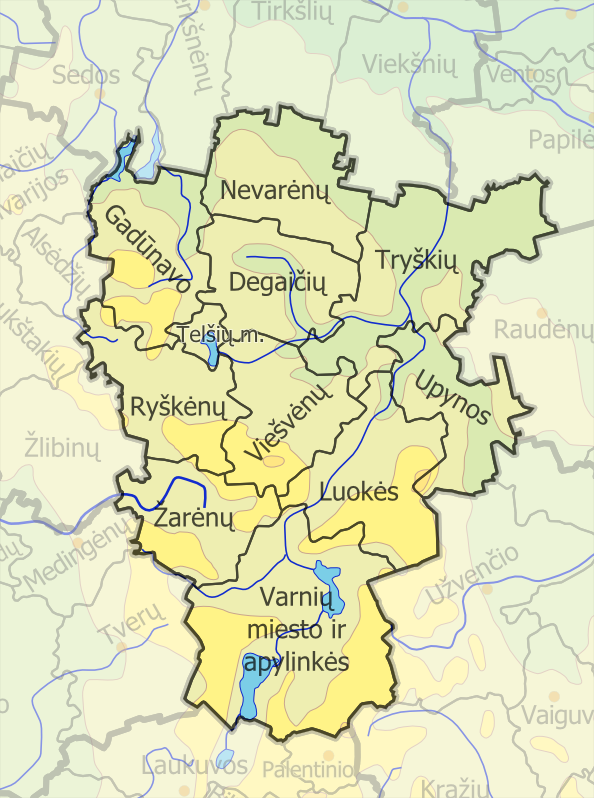 Padaryta iš :image:LietuvosSeniunijos.png